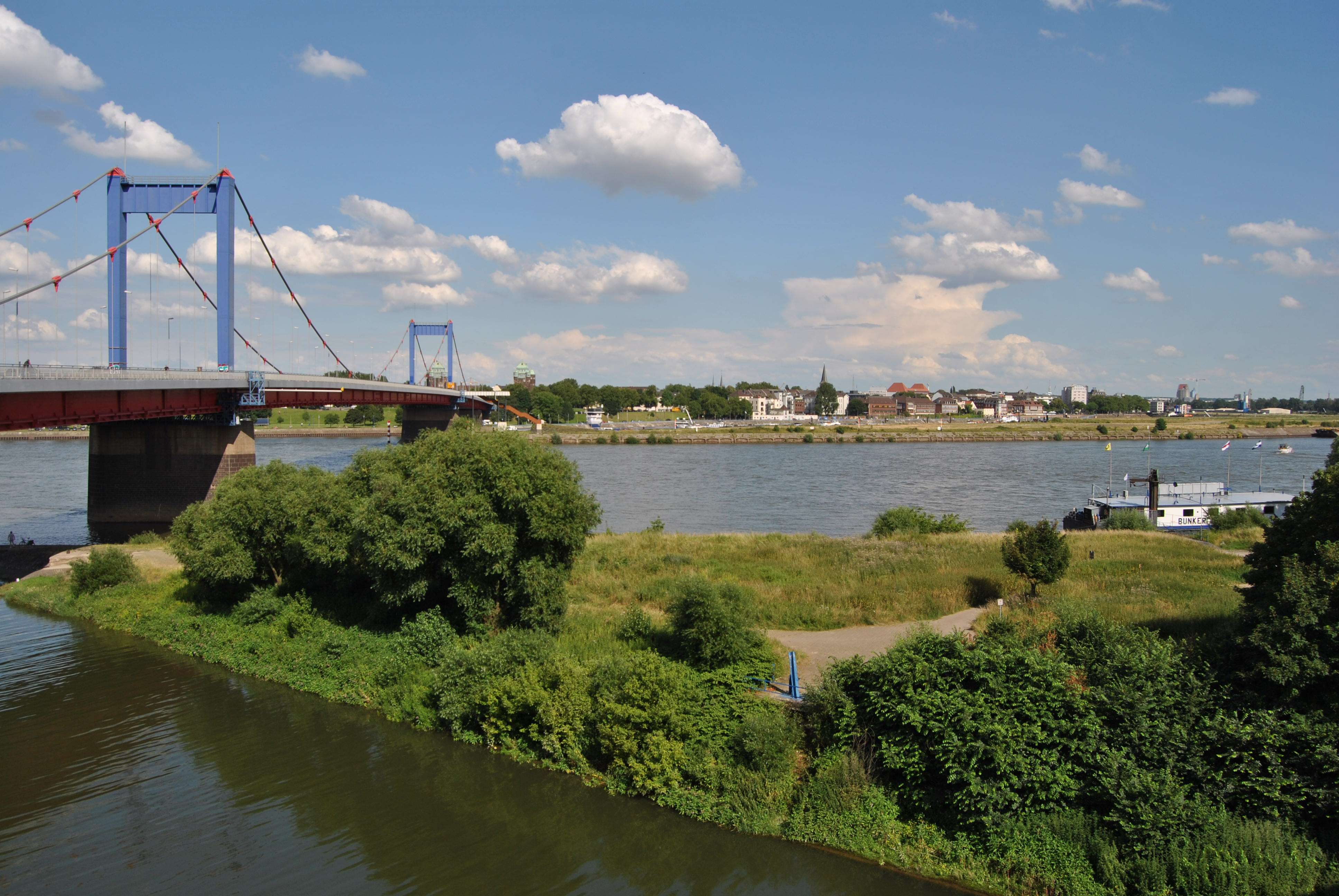 This photograph was taken with a Nikon D3000 Friedrich-Ebert-Bruecke mit dem Stadtteil Ruhrort in Duisburg